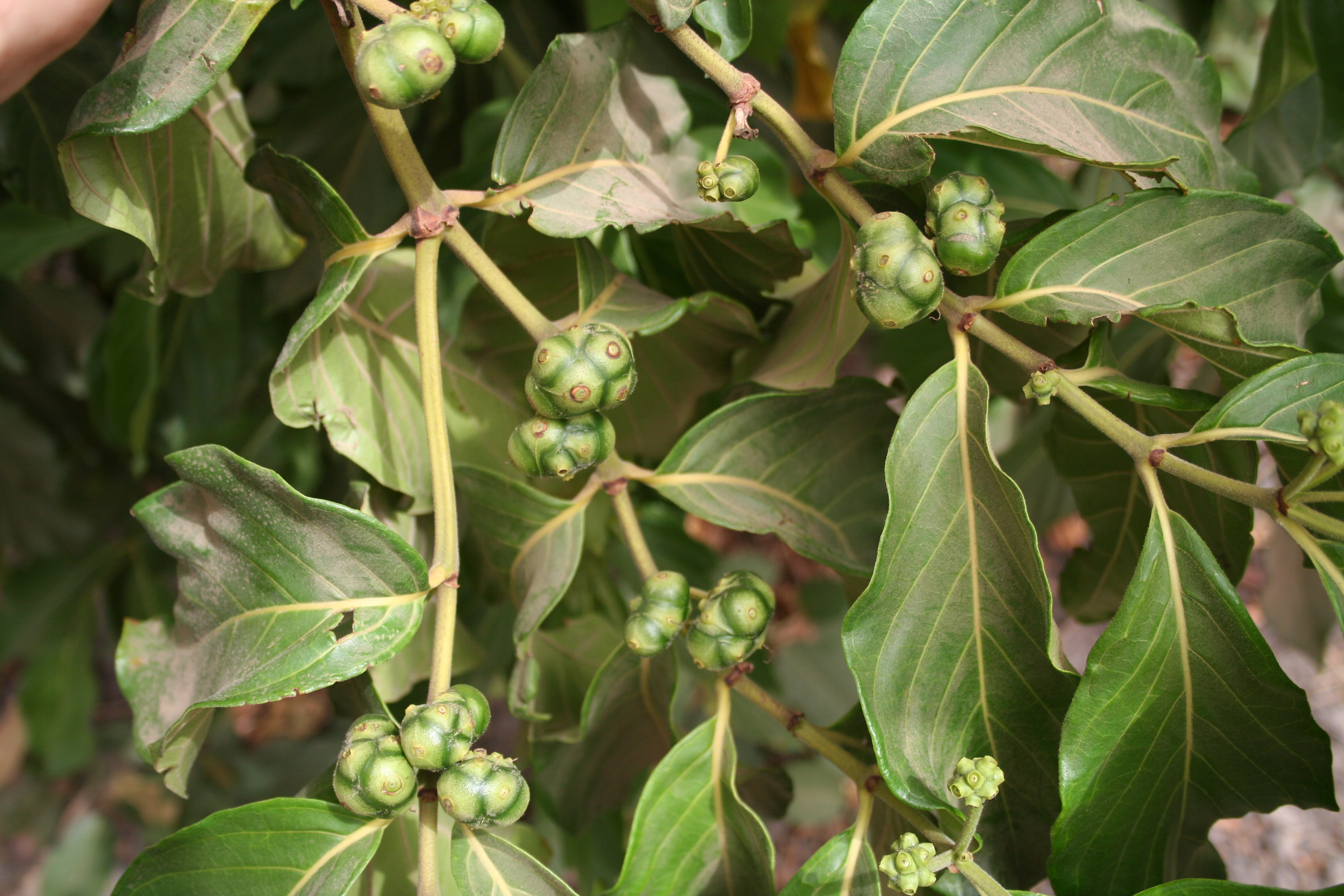 Morinda geminata, near F.Cl. de Patako, Senegal